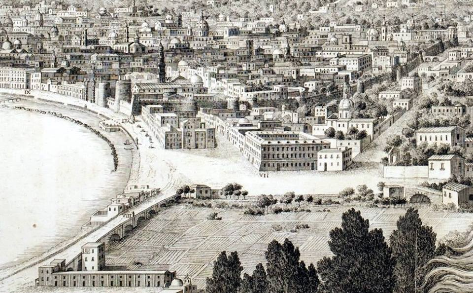 "Veduta scenografica a ponente della città di Napoli in Campagna Felice". Particolare della zona orientale della città, con via Marina, il Castello del Carmine, le mura aragonesi, il Ponte della Maddalena.